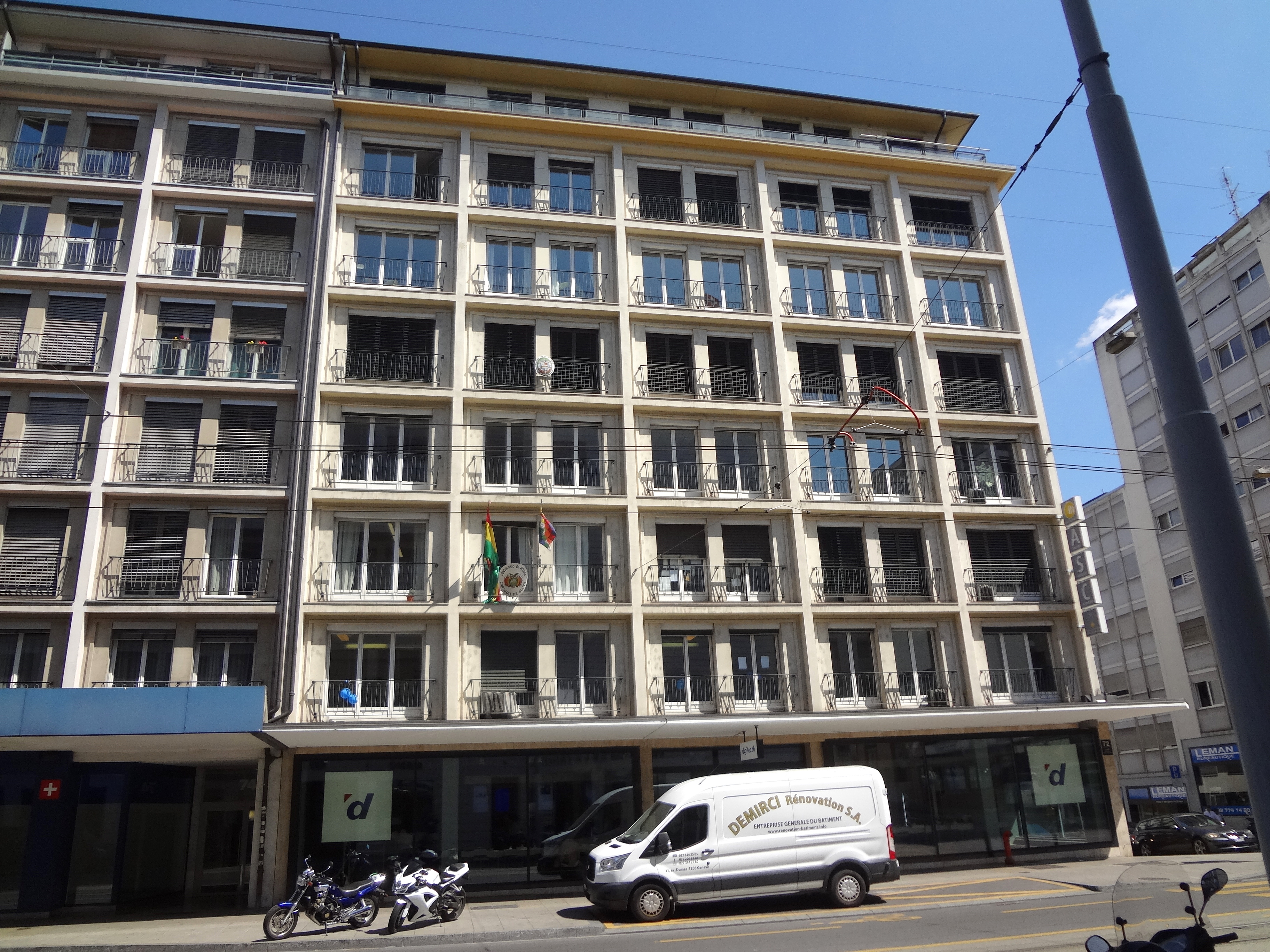 Bâtiment au 72 rue de Lausanne à Genève. Consulat de Bolivie au 2ème étage. Mission permanente et Consulat général de Panama au 4ème étage.